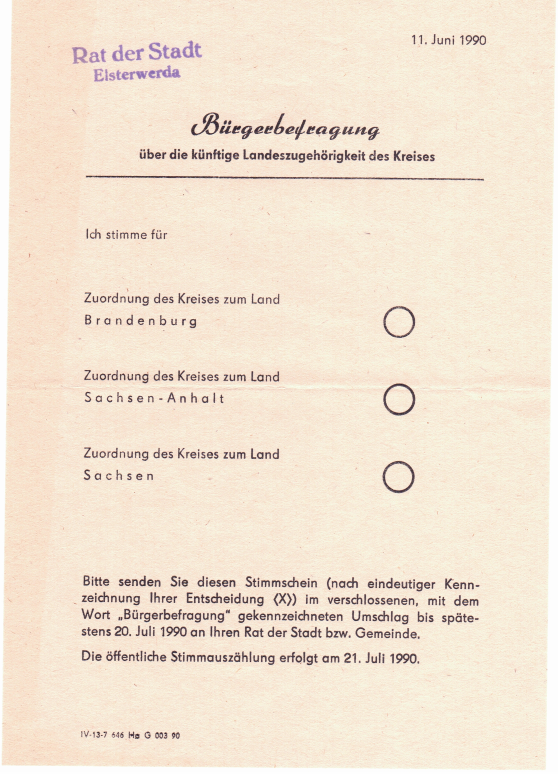 Bürgerbefragung der Stadt Elsterwerda über die zukünftige Landeszugehörigkeit des Kreises vom 11. Juni 1990